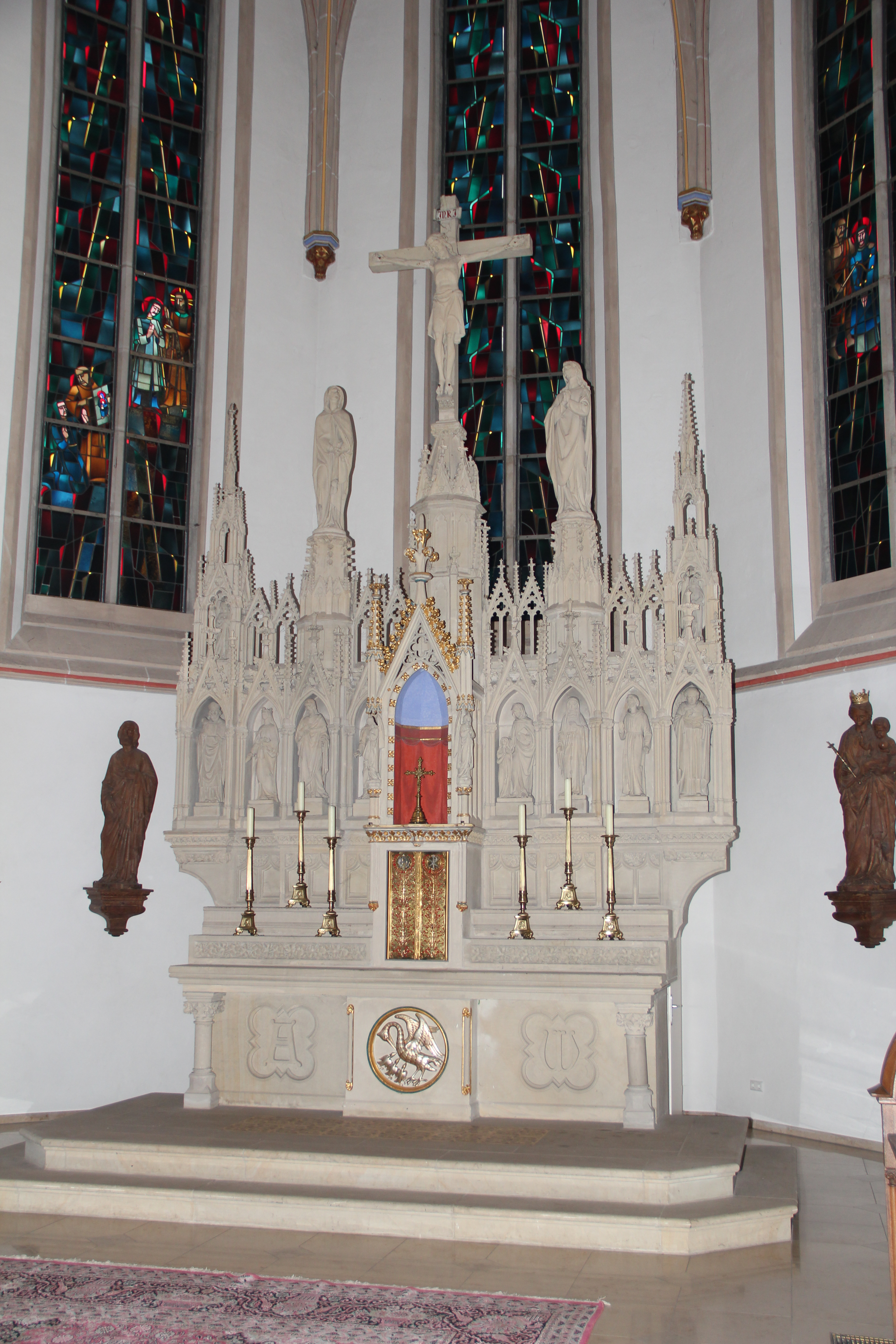 Hochaltar der Sankt-Catharina-Kirche in Dinklage